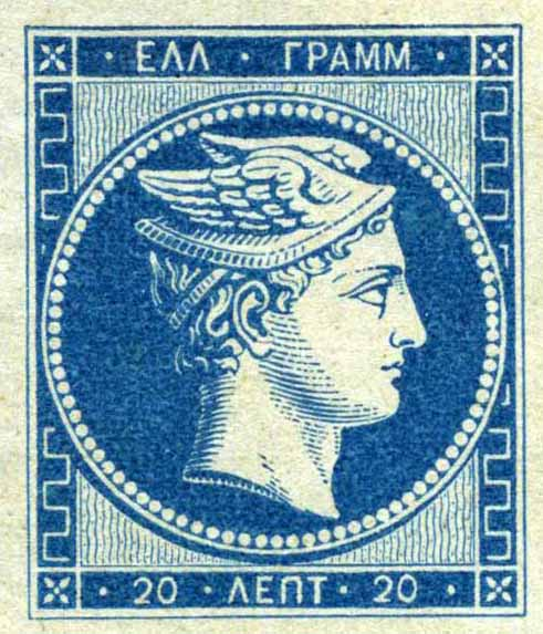 LHH - Tirage de Paris - 20 Lepta